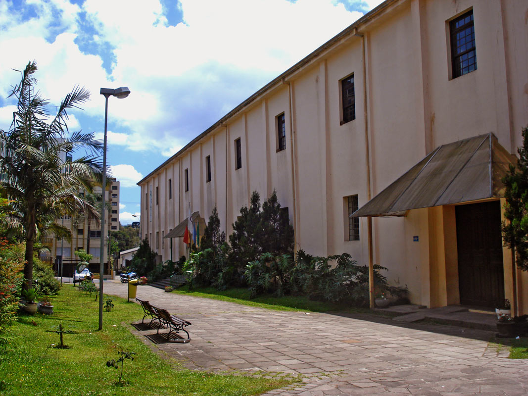 Centro Cultural Henrique Ordovás Filho em Caxias do Sul, instalado no prédio histórico da antiga Cantina Antunes